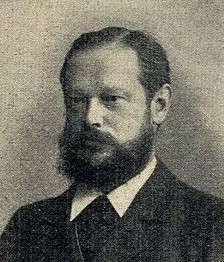 Prof. Dr. Richard Börnstein, 1906